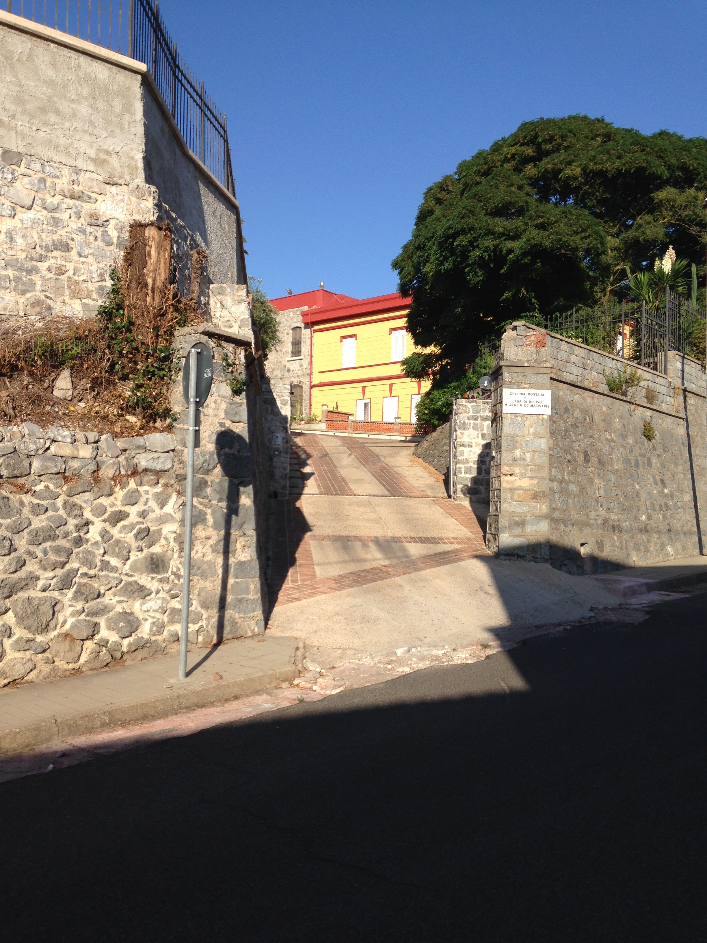 Ingresso principale di tutto il complesso e facciata dell'edificio dopo i lavori di restauro